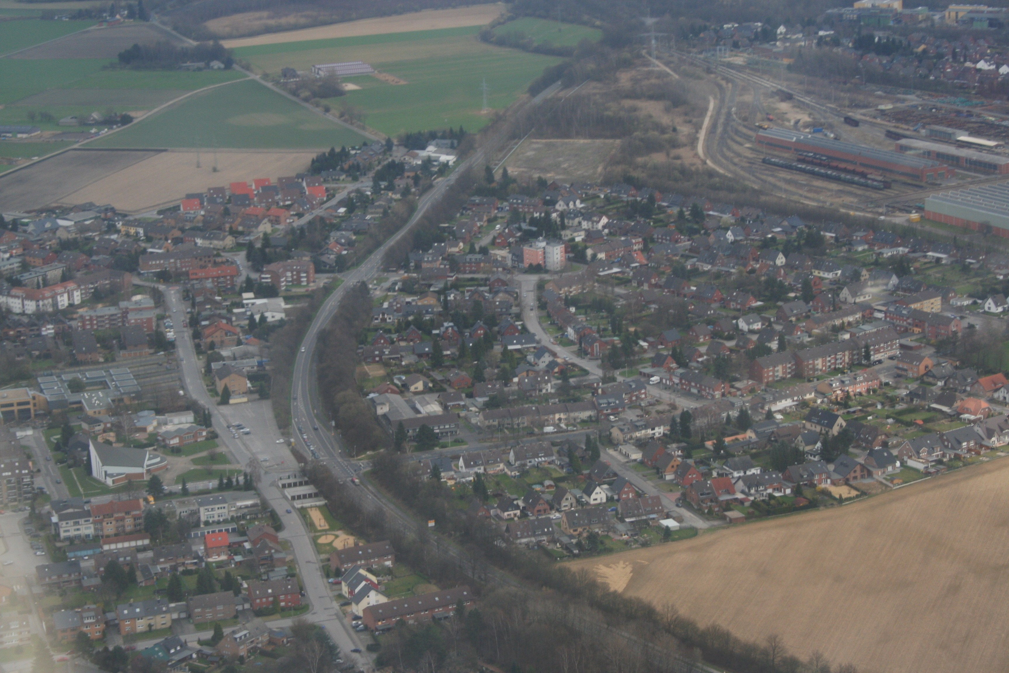 Habbelrath, Luftbild von Westen entlang der Dürenerstraße, oben rechts Technikzentrum Tagebaue (TT HW), Hauptwerkstatt von RWE